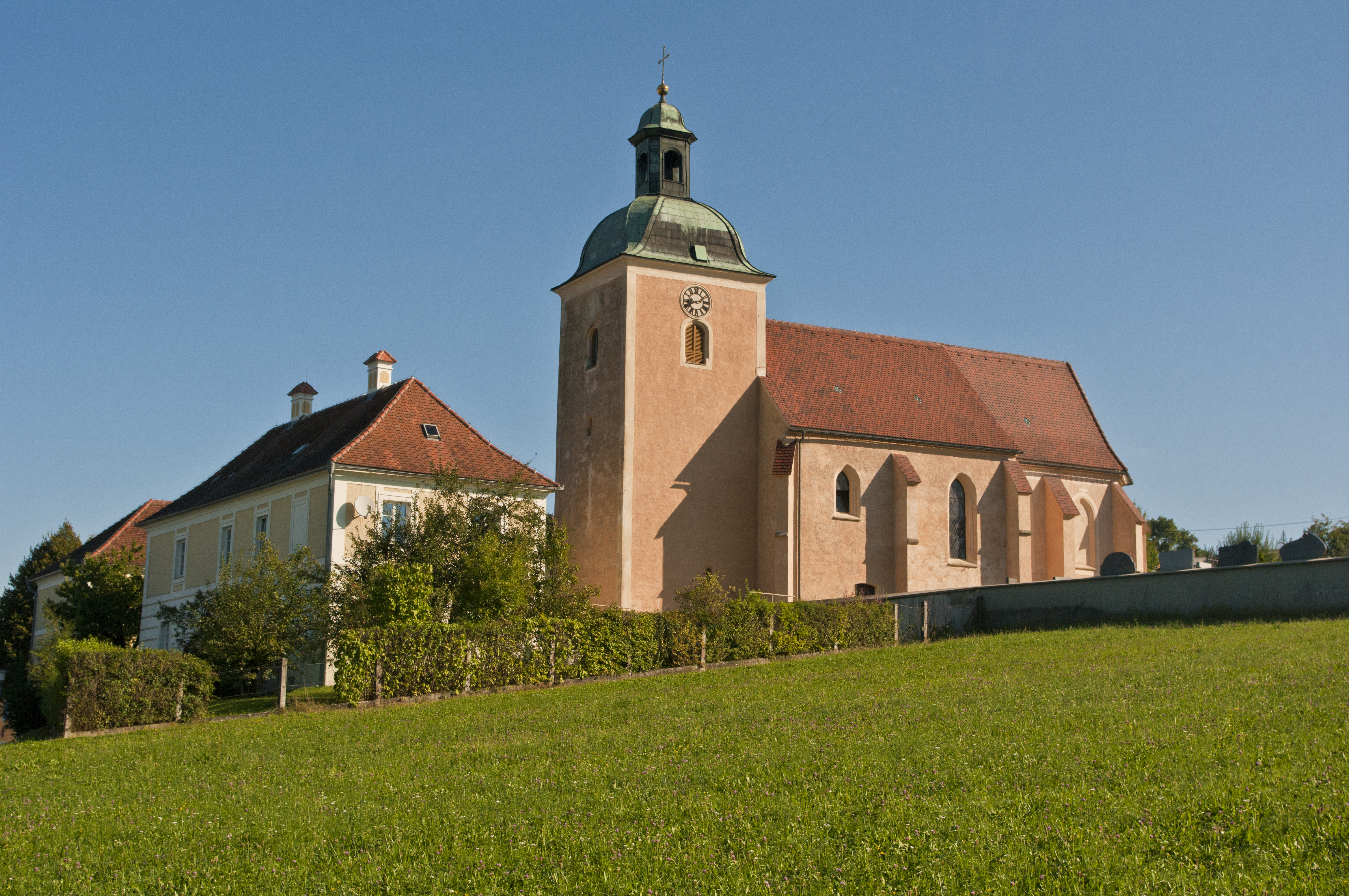 Kath. Pfarrkirche hl. Johannes der Täufer und Friedhof